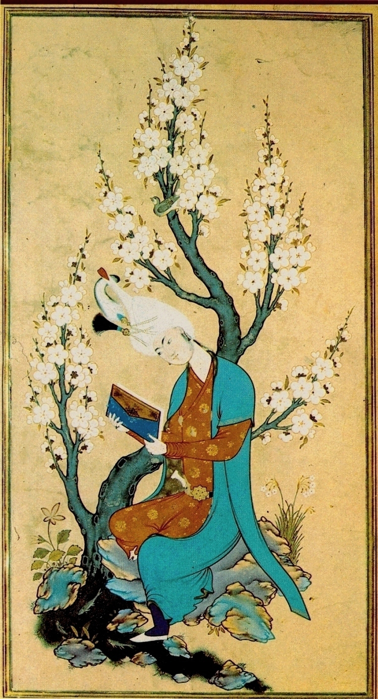 Султан Мухаммед. Юноша с книгой. Миниатюра, 1540-е годы. РНБ, Санкт-Петербург